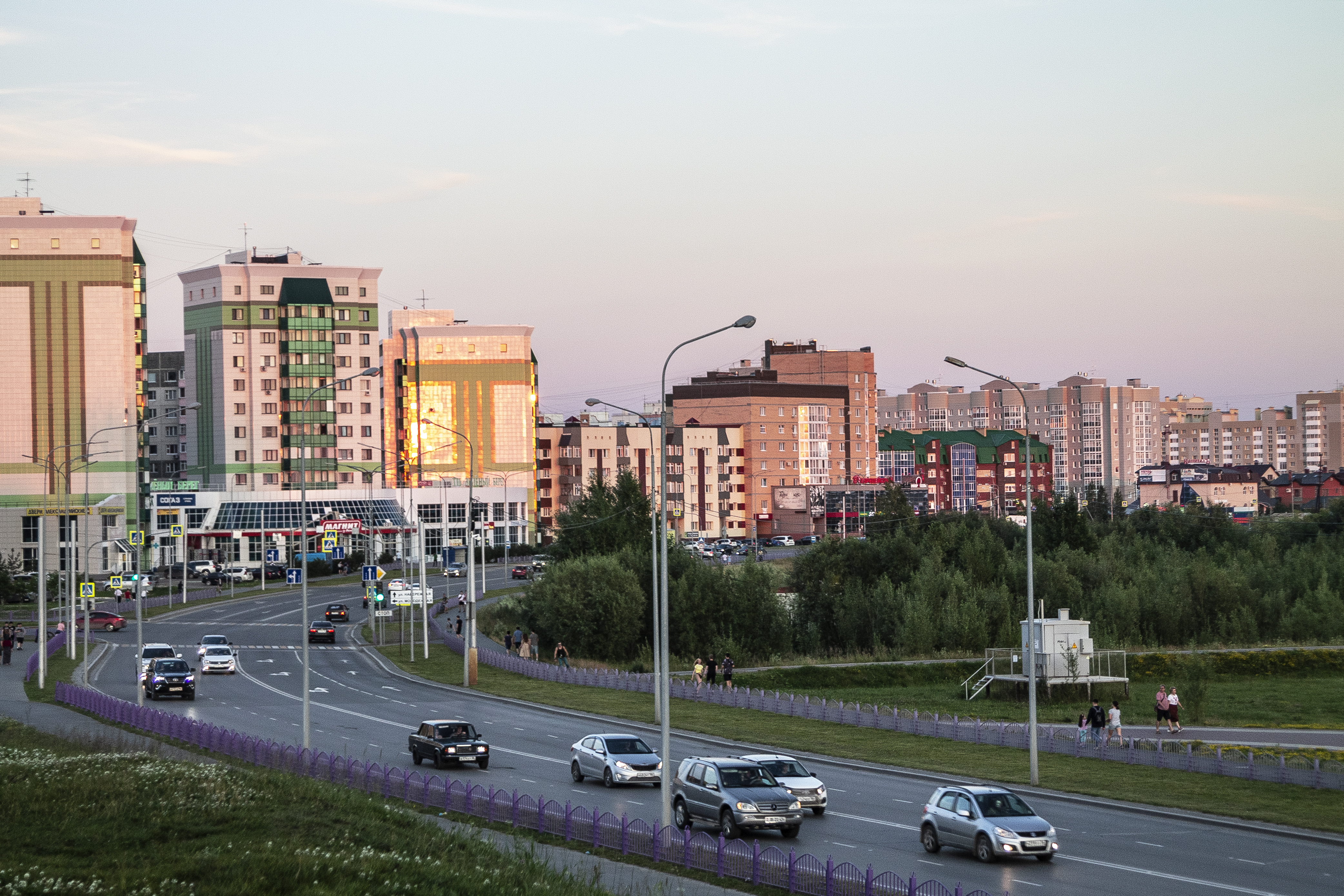 Нефтеюганск. Улица Набережная